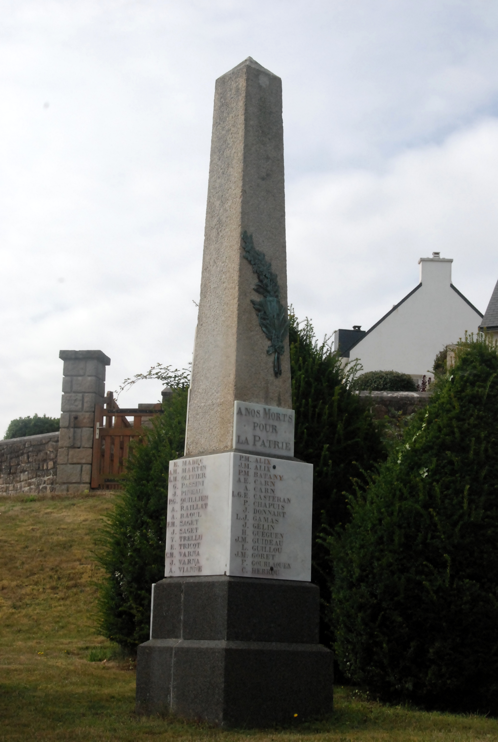 Monument aux Morts - Roscanvel-29